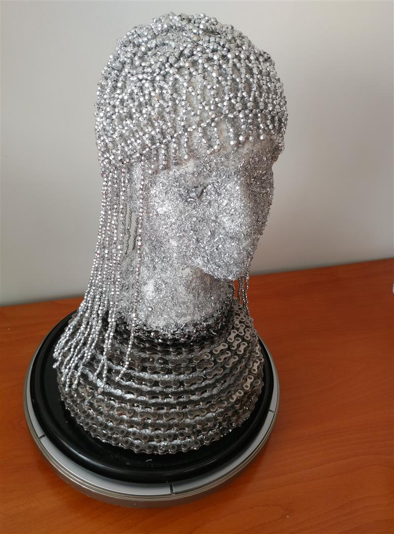 אשת פלדה משרשראות אופניים.